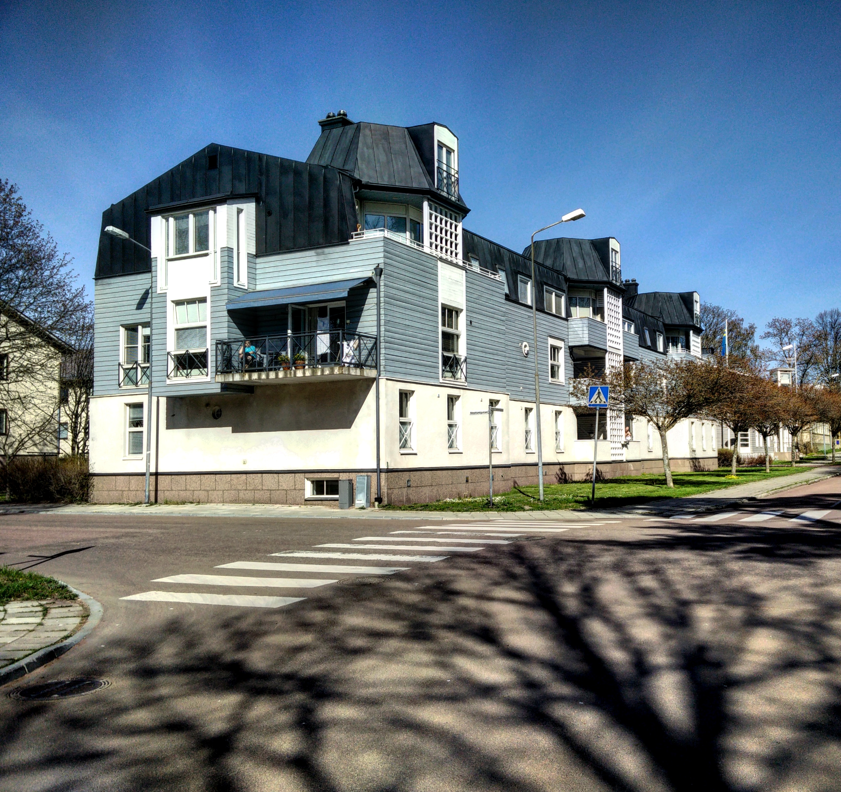 Vid hörnet Norra Esplanaden/Neptunigatan.